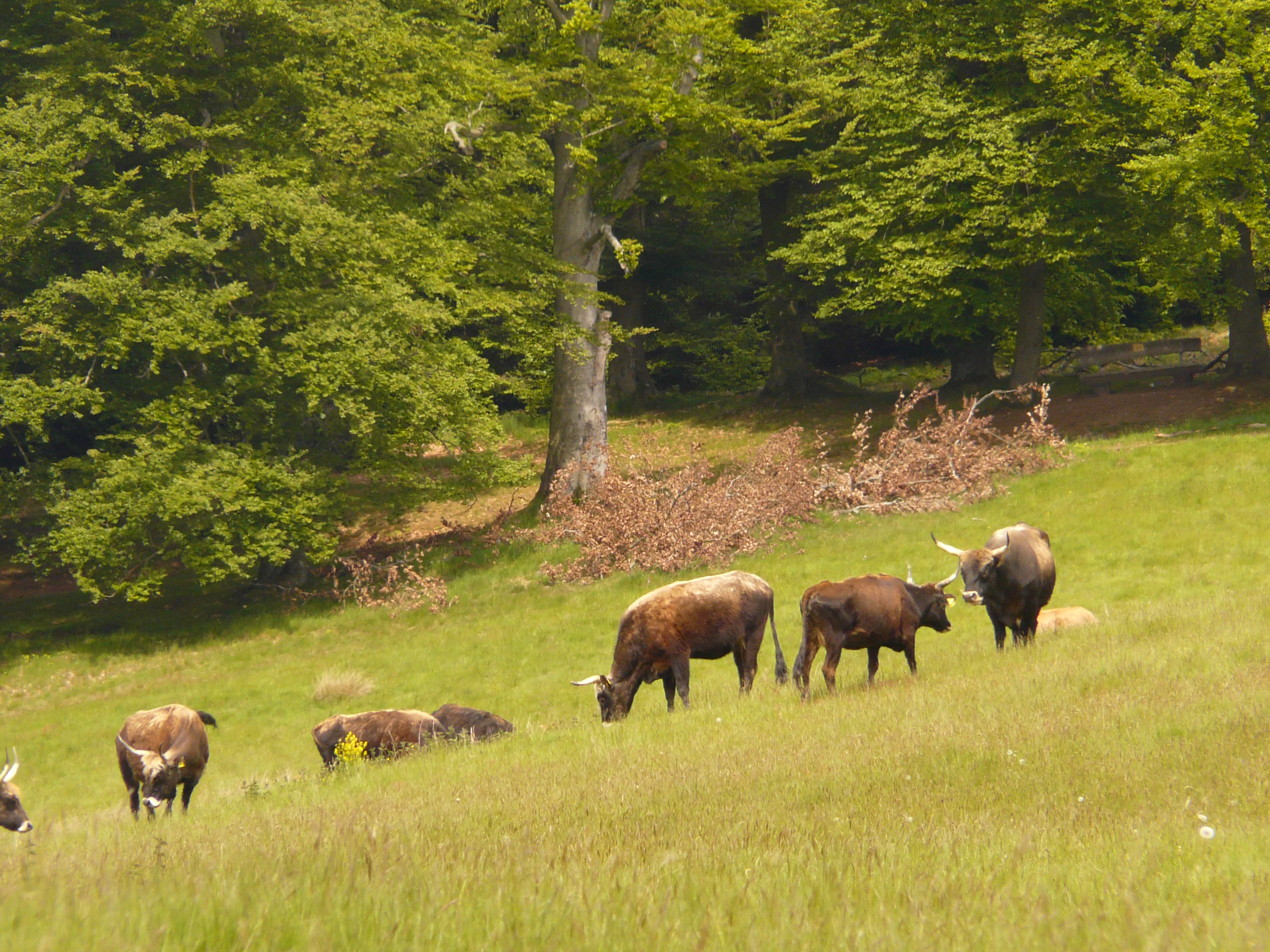 NSG MK-043 Stilleking: Heckrinder am Waldrand